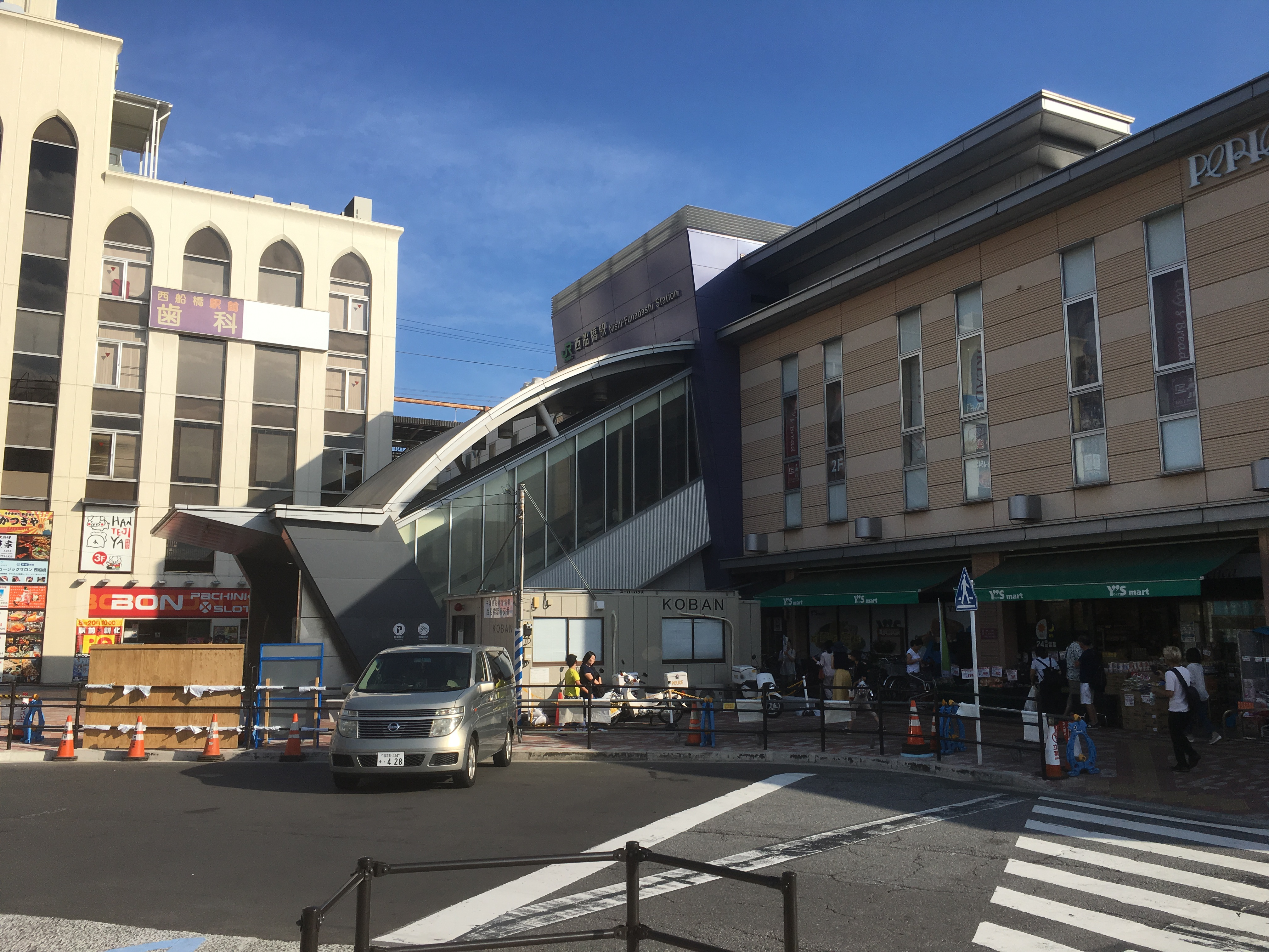 西船橋駅 (Nishi-Funabashi Station)